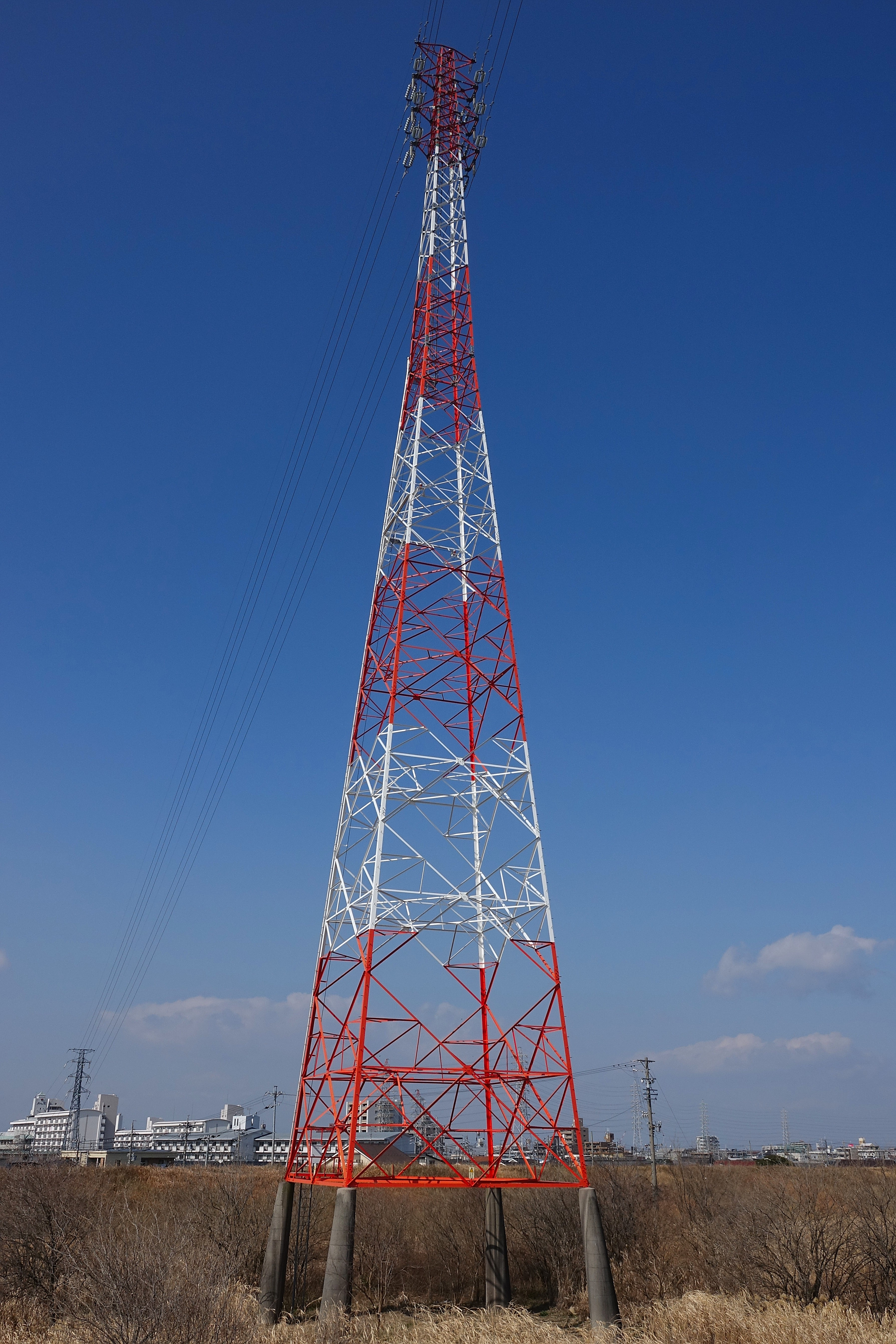 紅白送電鉄塔 日本、東海地方